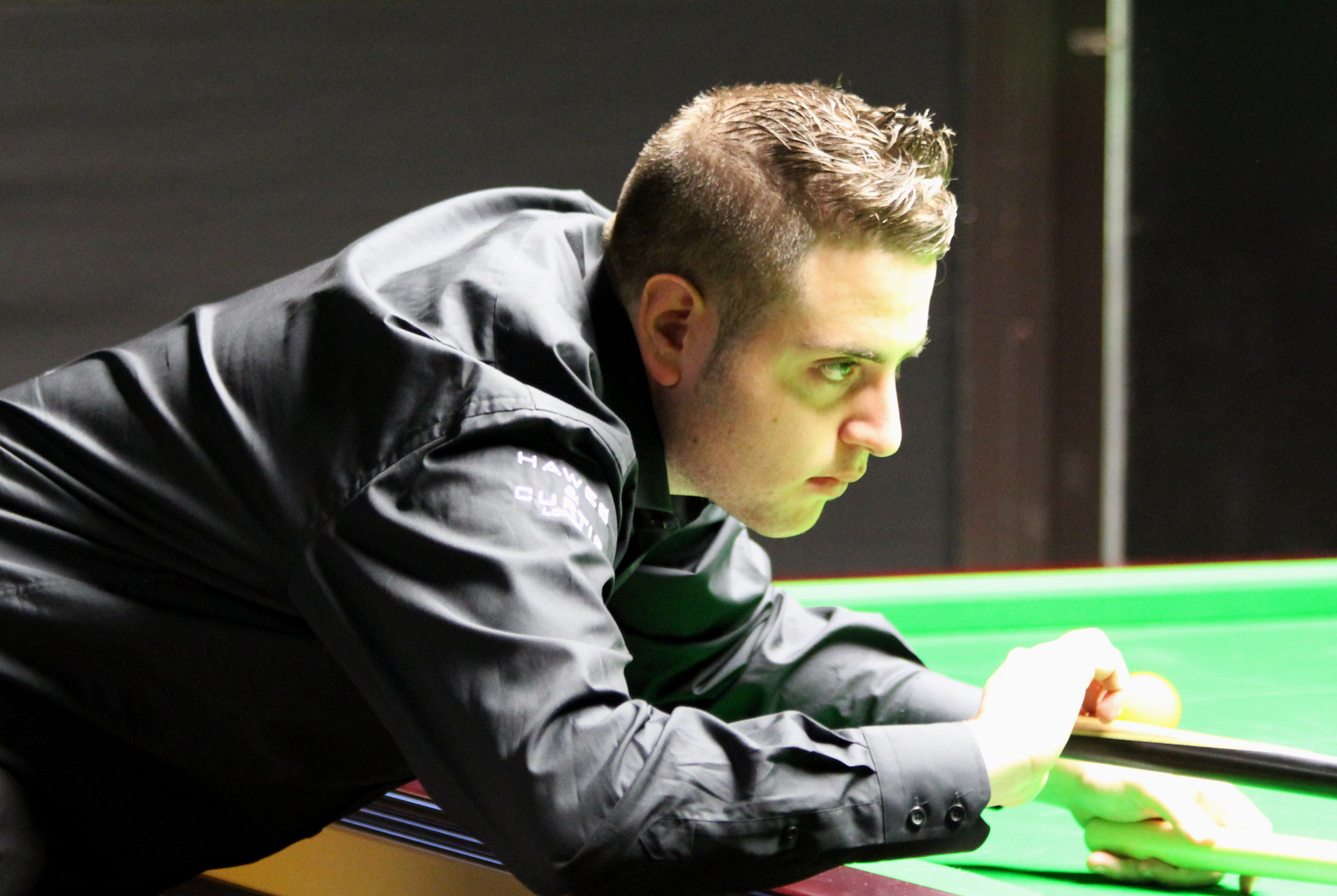 Eden Sharav beim Paul Hunter Classic 2014